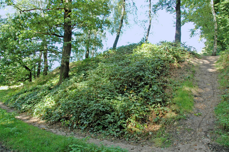 Germany Bergkamen Bodendenkmal Bummannsburg